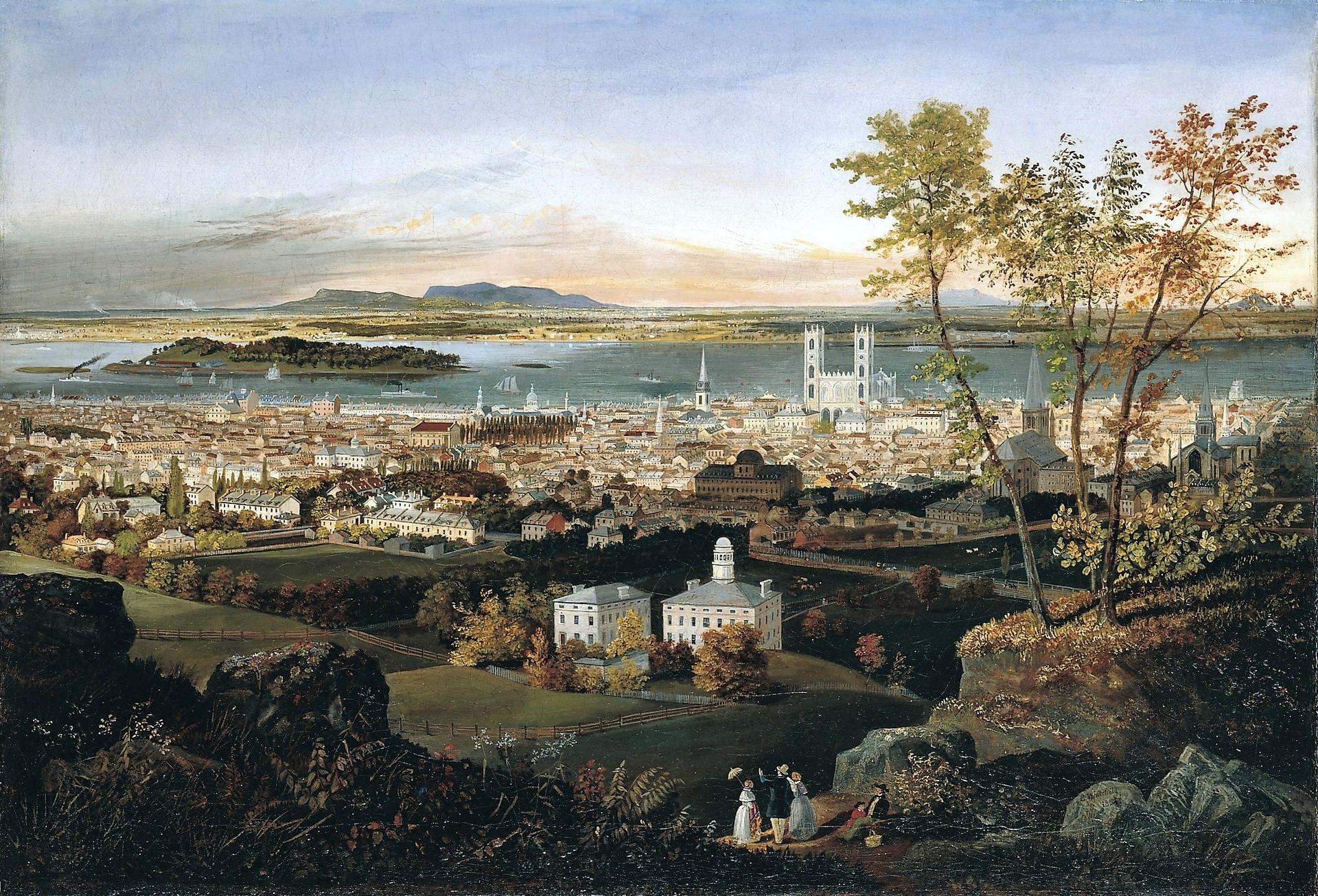 Tableau peint en 1853-1854 par Edwin Whitefield (1816-1892). Dans la collection du Musée national des beaux-arts du Québec.